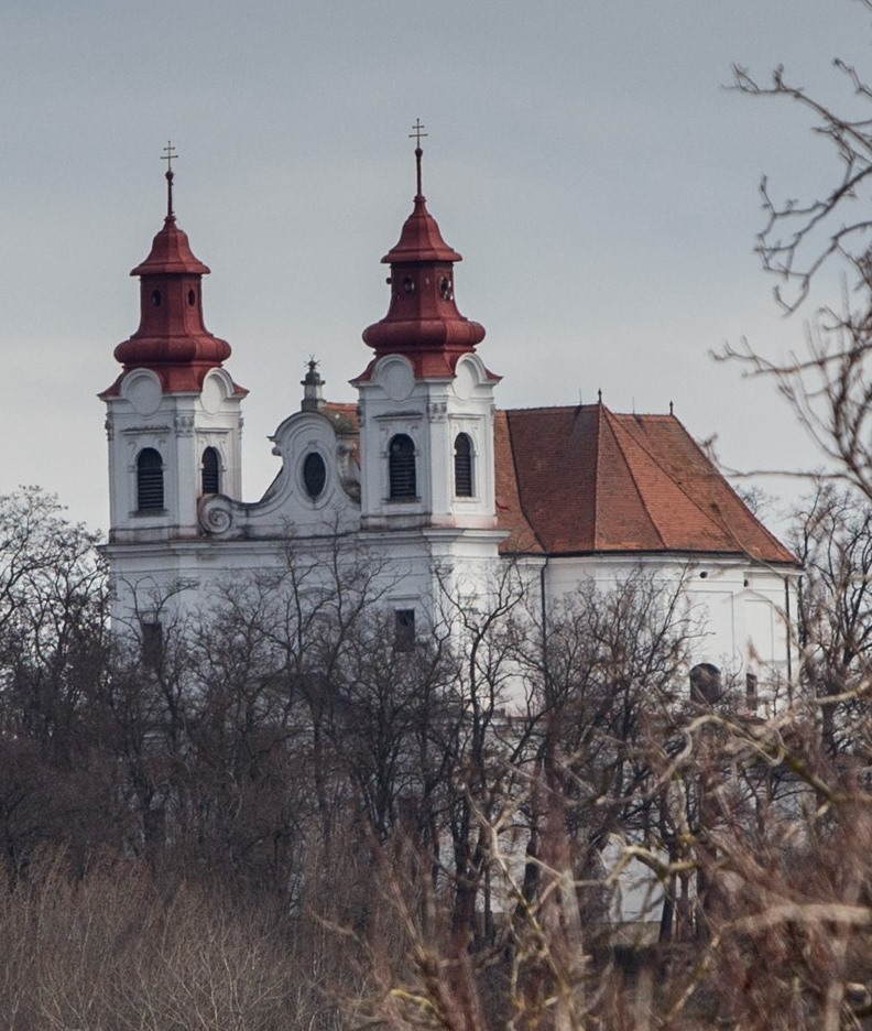 Kostel Lechovice (2017)